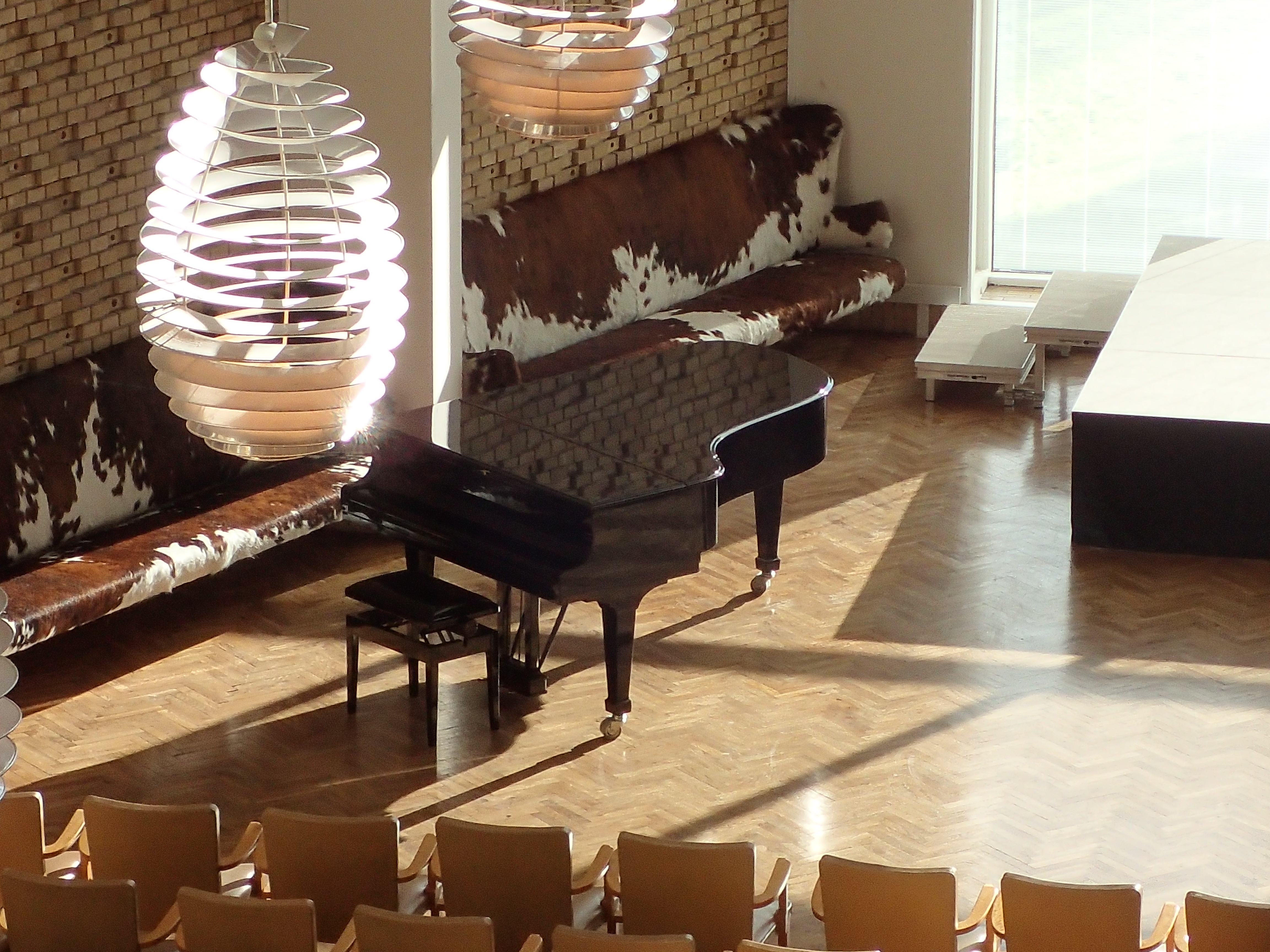 Klaver i Aula-en ved Aarhus Universitet.